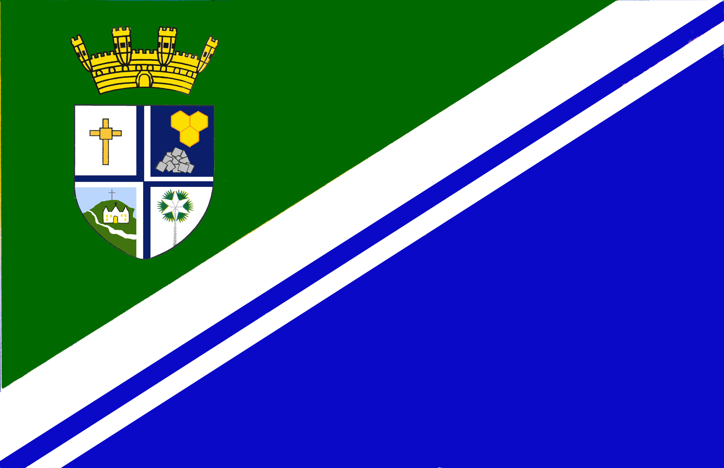 bandeira do municipio de monsenhor gil